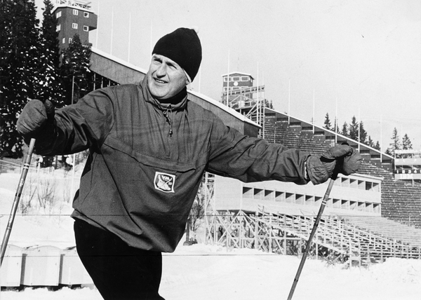 portrett, mann, disponent, idrettsleder, stående knefigur, skiutstyr, Holmenkollbakken.